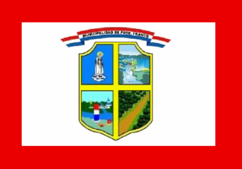 Bandera de Pdte. Franco (Paraguay).